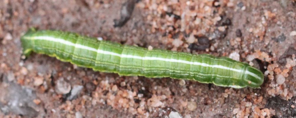 Raupe des Kiefernspanners (Bupalus piniaria) am 6.11.2016 im Pfälzerwald